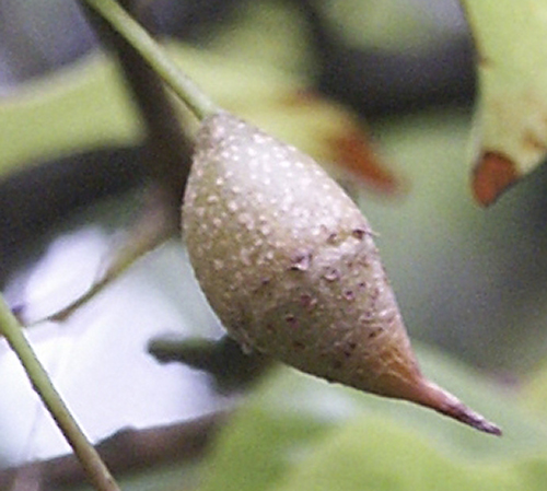 Détail du fruit de Sinojackia rehderiana - Jardin botanique de Strasbourg - France